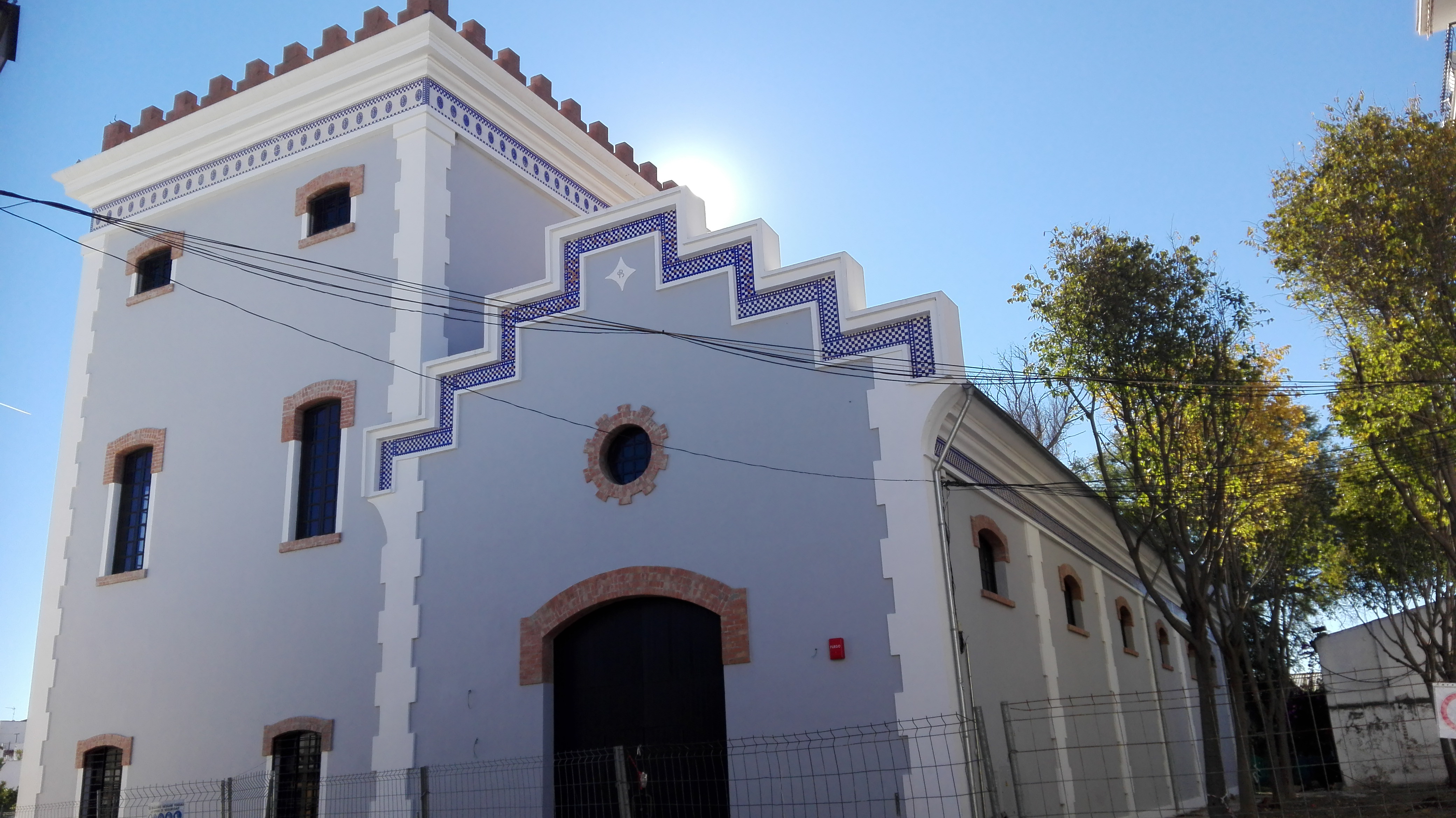 Vista frontal del edificio.